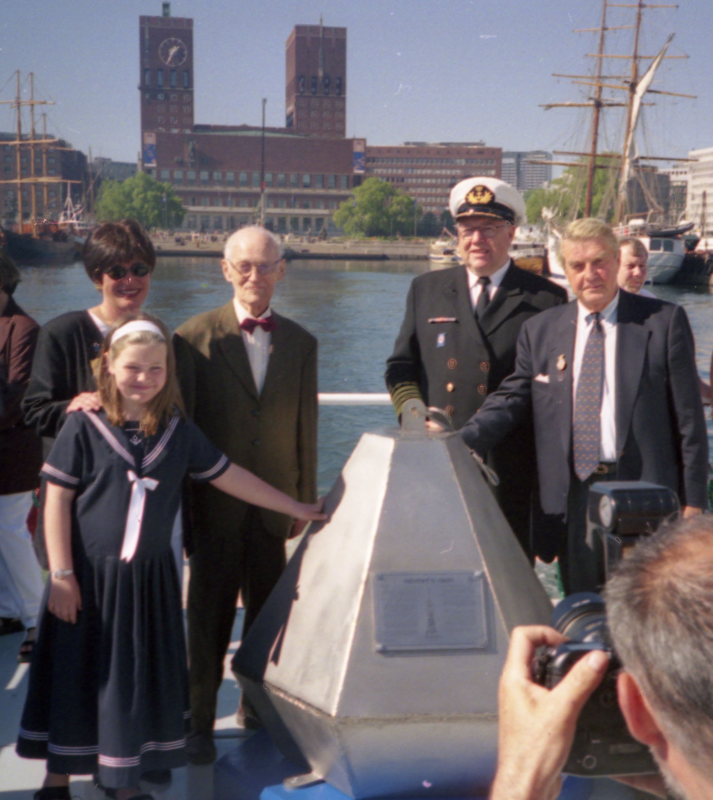 Oslos tidskapsel med hilsener til fremtiden overleveres fra Oslo kommune til Oslo havn. På bildet bidragsyter Elise Flåten Øygaren (8), Leder for 1000-årsfeiringen Gro Balas, bidragsyter Martin Gauslaa (92), havnedirektør Per Mauritz Hanssen, ordfører Per Ditlev-Simonsen.